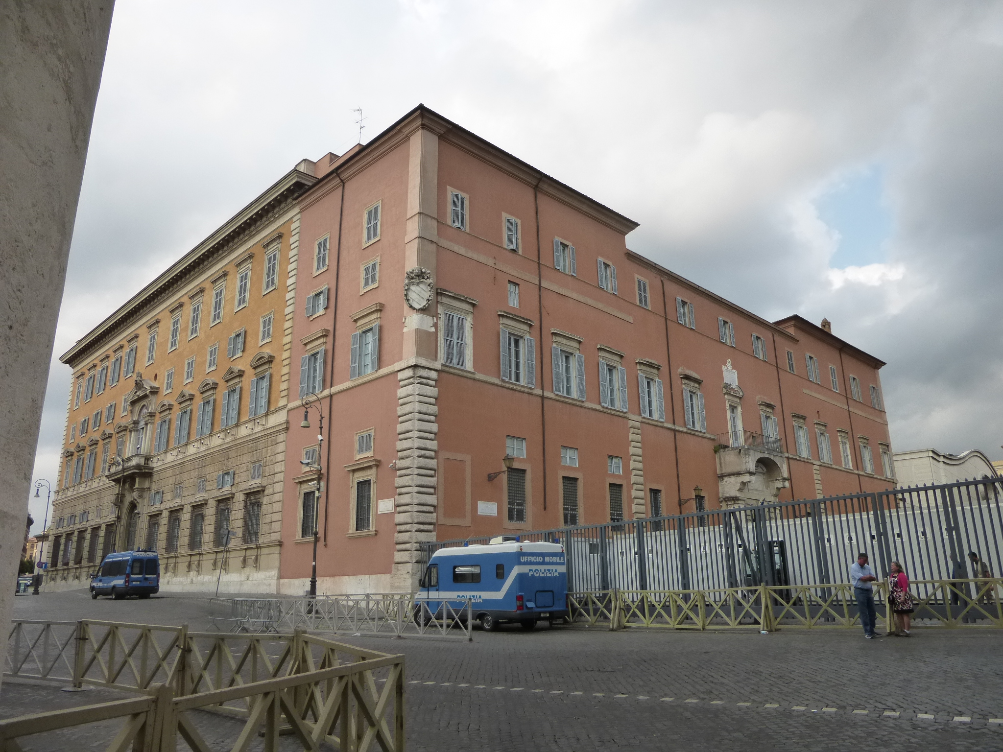 Roma, piazza del sant'Uffizio - palazzo del sant'Uffizio